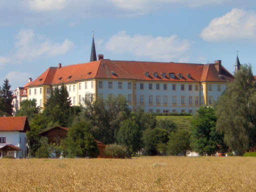 Kloster St. Josef in Zangberg, Ansicht von Süden